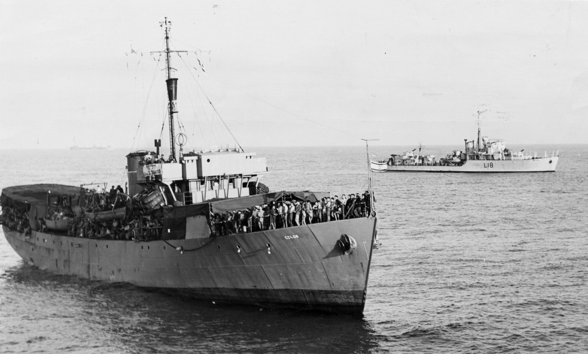 פלי"ם ספינות המעפילים א - יאשיהו ודג'ווד (BEUHARNIOS) - הכניסה לנמל חיפה בליווי משחתת בריטית